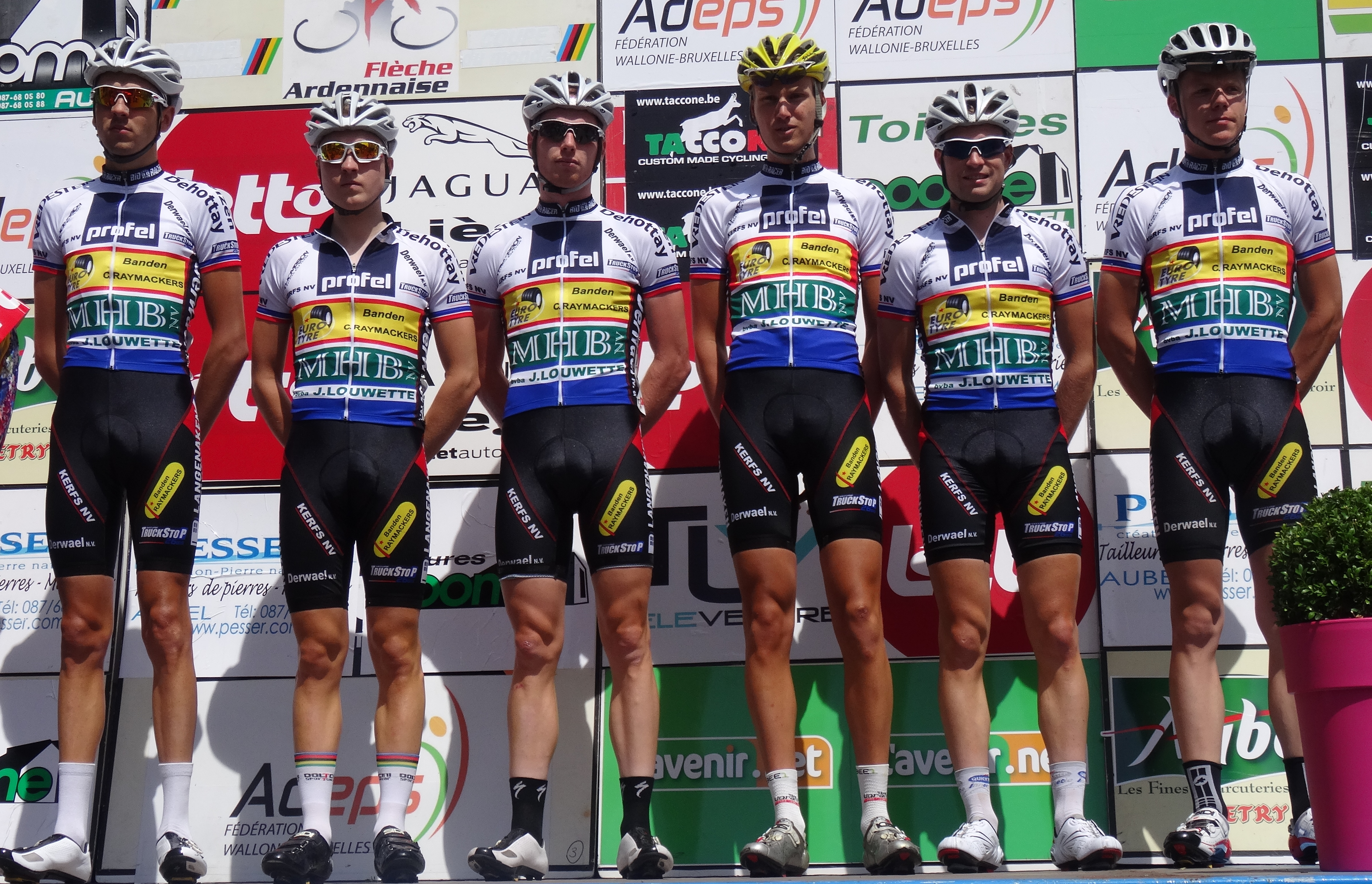 Reportage photographique réalisé le dimanche 22 juin à l'occasion du départ et de l'arrivée de la Flèche ardennaise 2014 à Herve, Belgique.